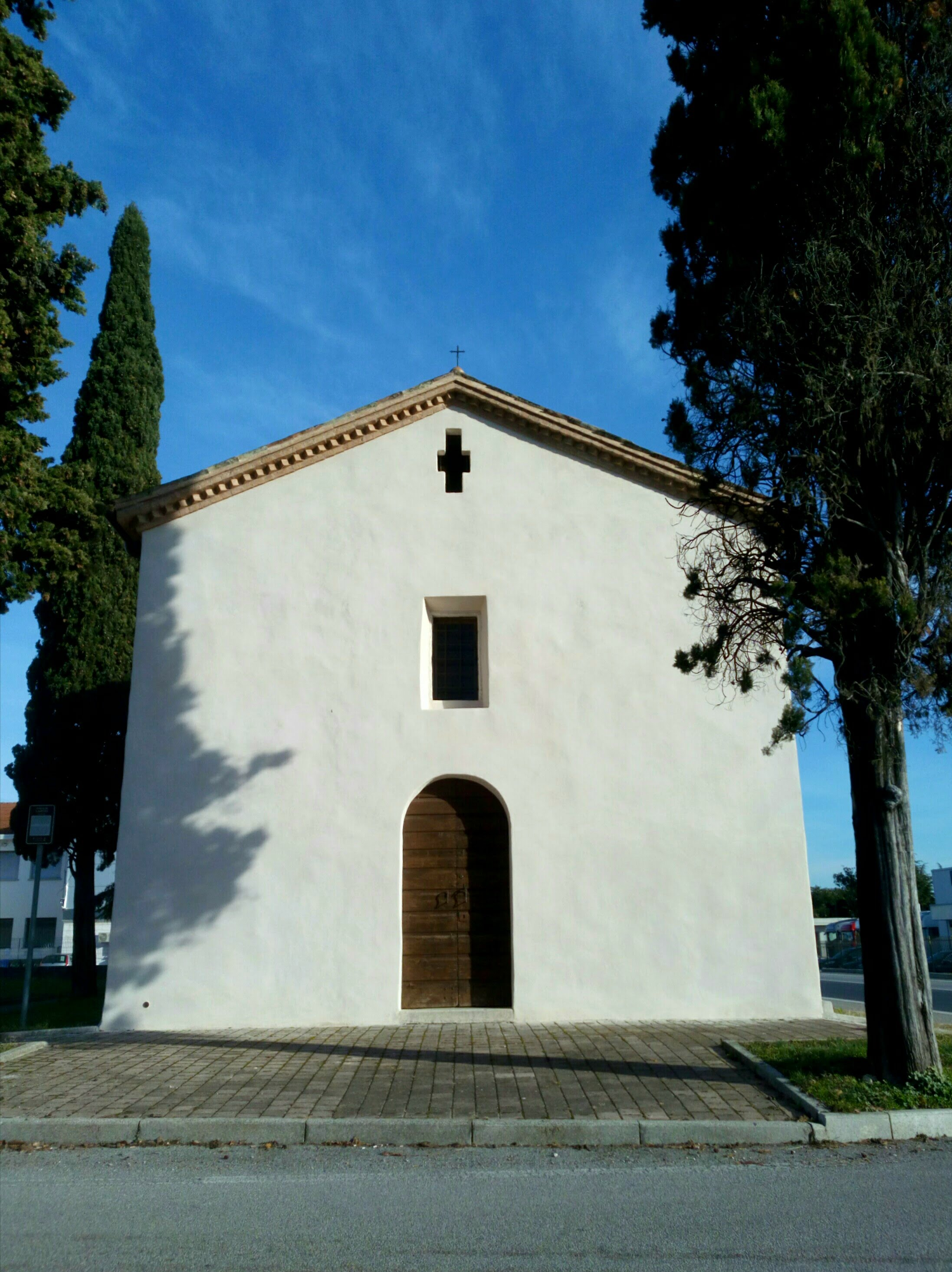 Chiesa di San Martino ai Gai dopo il restauro (scatto di Paolo Steffan, dicembre 2017).